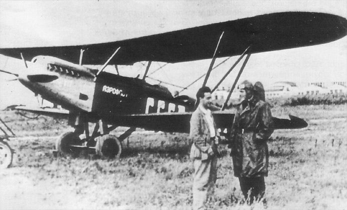 П-5 аэрофлота (пассажирская версия Р-5) на аэродроме.